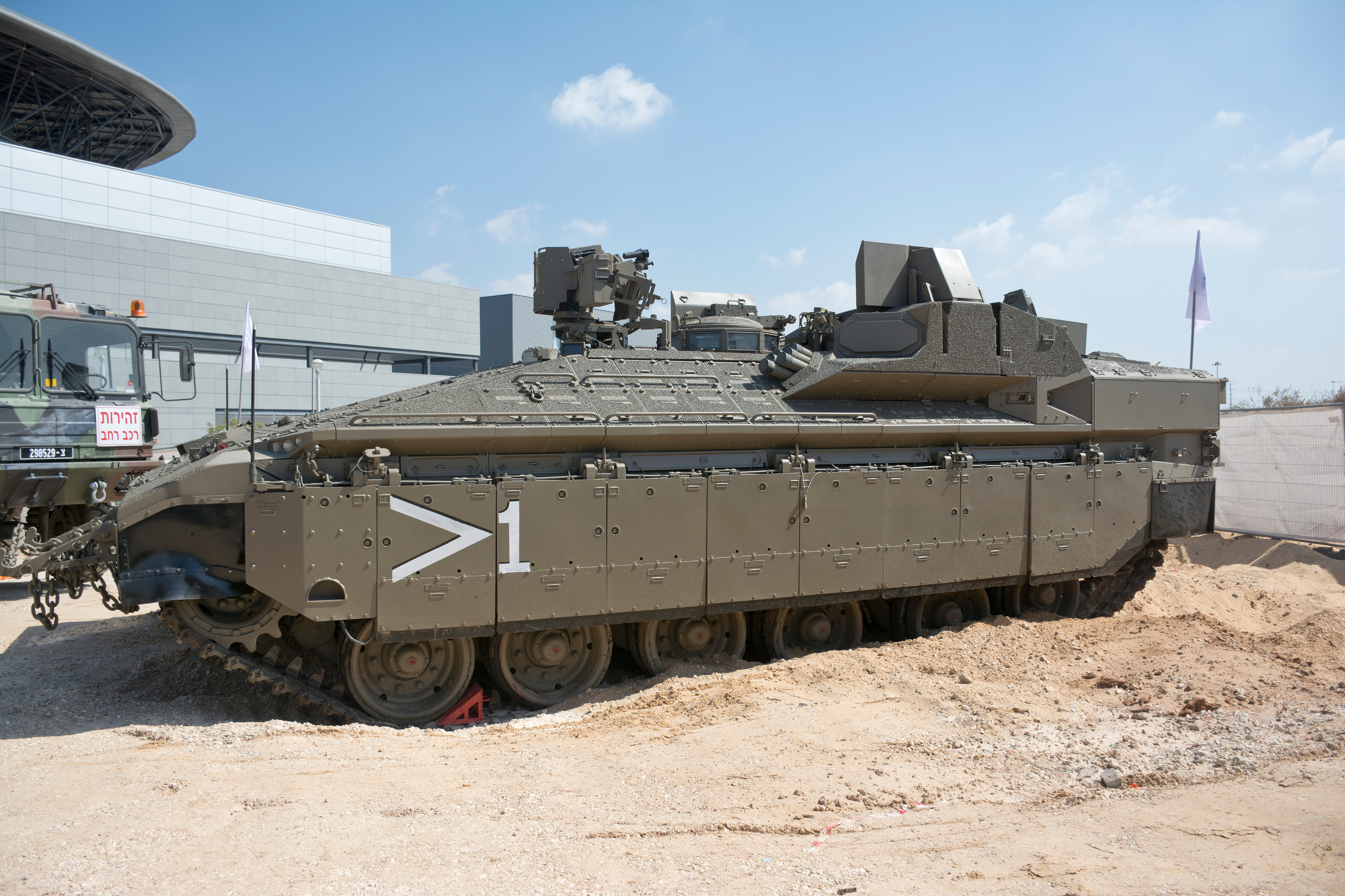 Nammer Engineering (Nemmera), Our IDF 70, Israel נמ"ר הנדסי (נמר"ה), תערוכת צה"ל שלנו 70, ישראל